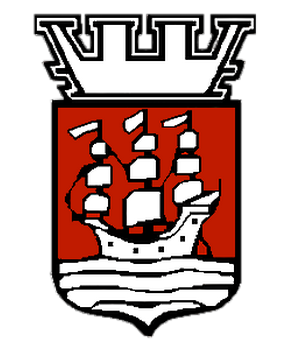 Blason de Thiers 63